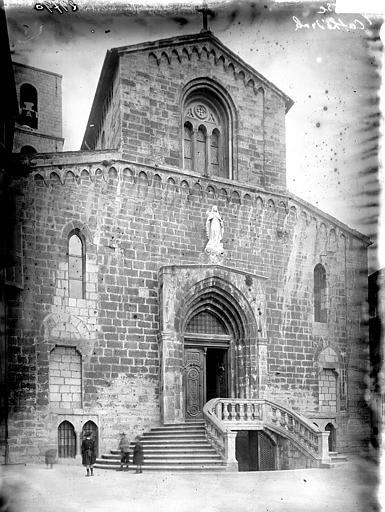 Façade ouest de la Cathédrale de Grasse (Alpes-Maritimes, France)